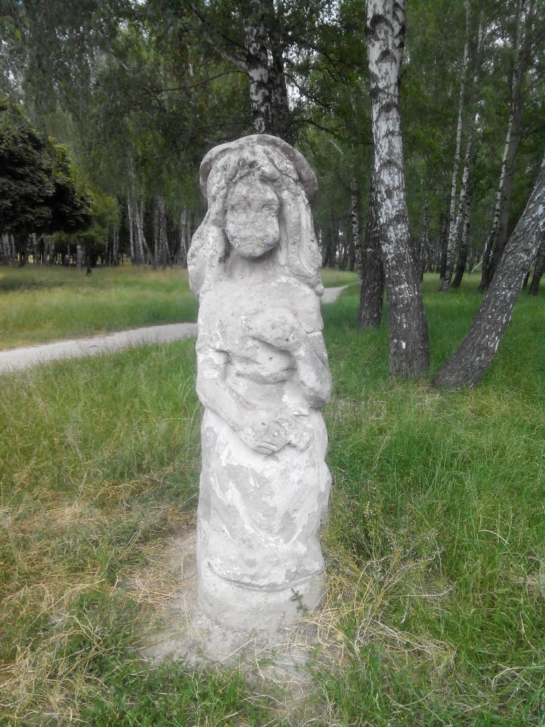 Каменный идол советской культуры